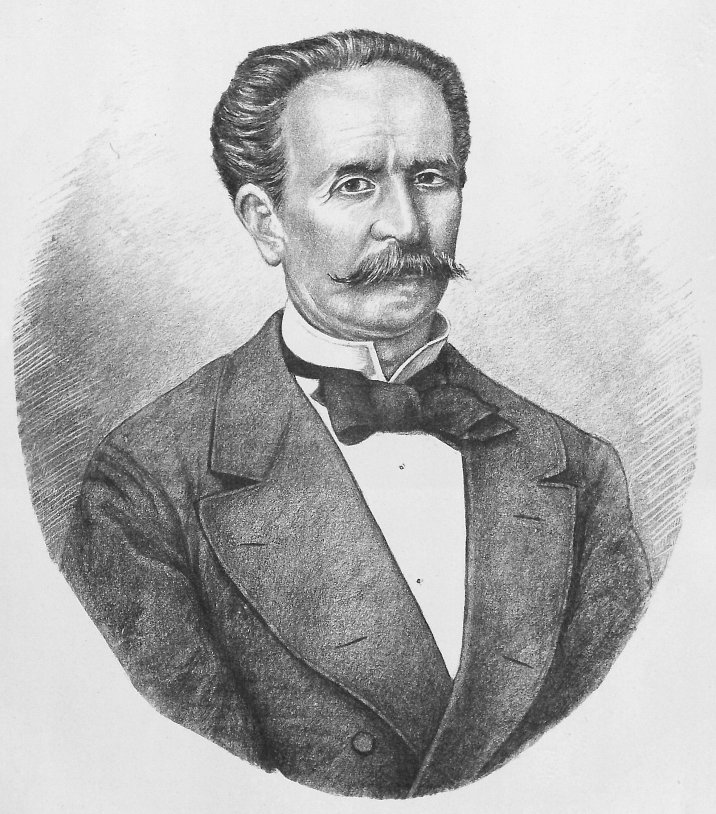 Portraits contemporains avec autographes : Politique, armée, clergé, letters, théatres & arts dessines & lithographies par D. William Bukarest, 1881 Alexandre Const. Plagino - Ancien Ministre des affaires étrangerès